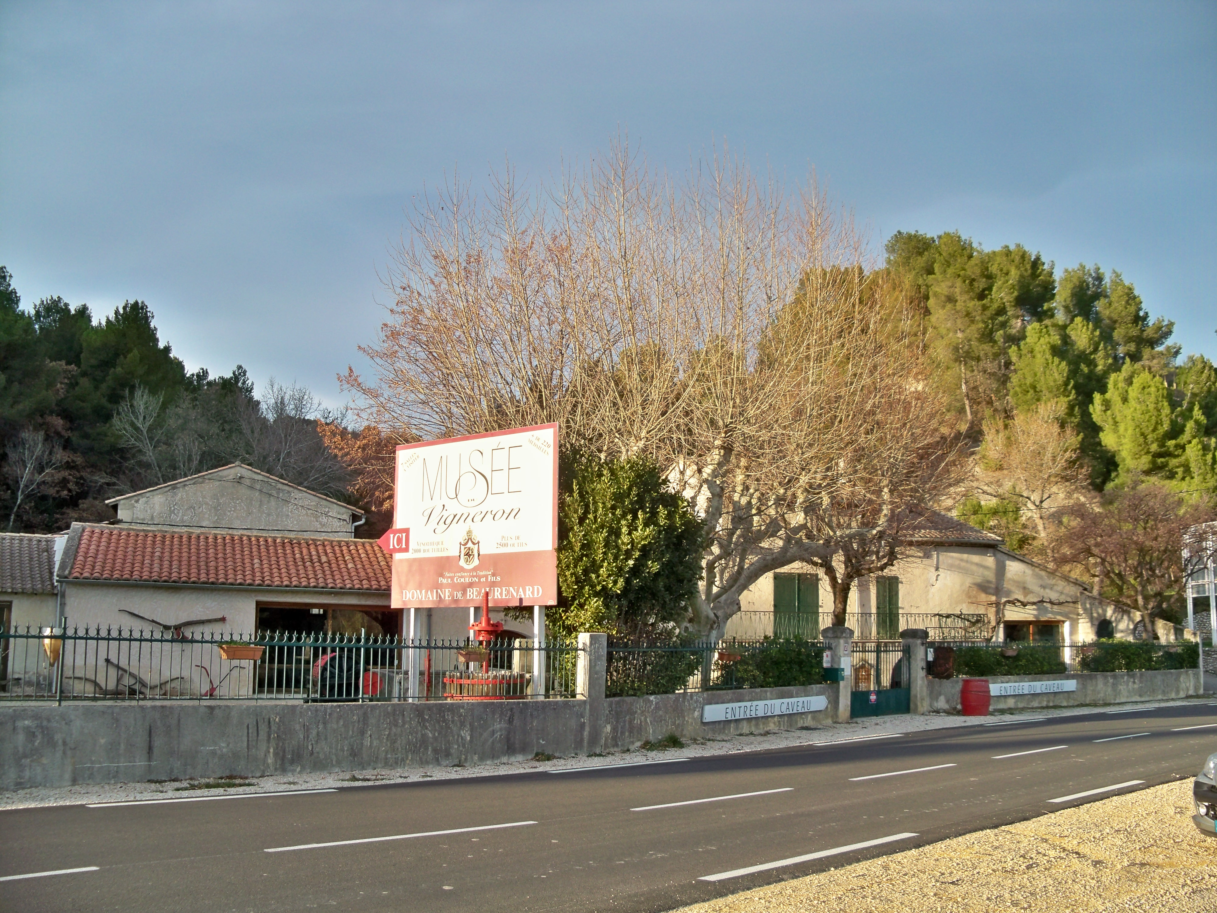 domaine vinicole et musée vigneron à Rasteau (84)